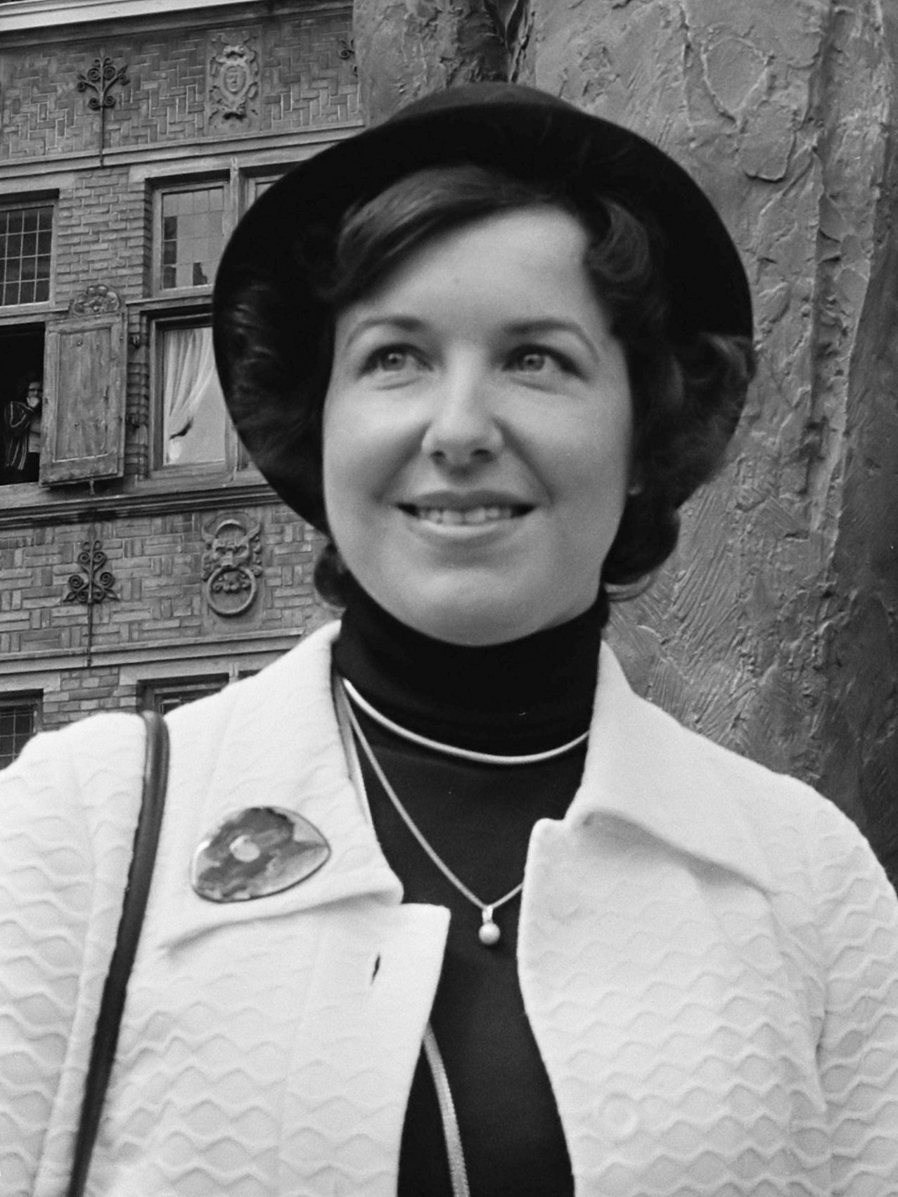 Onthulling van het standbeeld van Albert Schweitzer op de Brink in Deventer; het beeld is gemaakt door Pieter de Monchy. Kleindochter Christiane Eckert voor het beeld van Albert Schweitzer 21 mei 1975